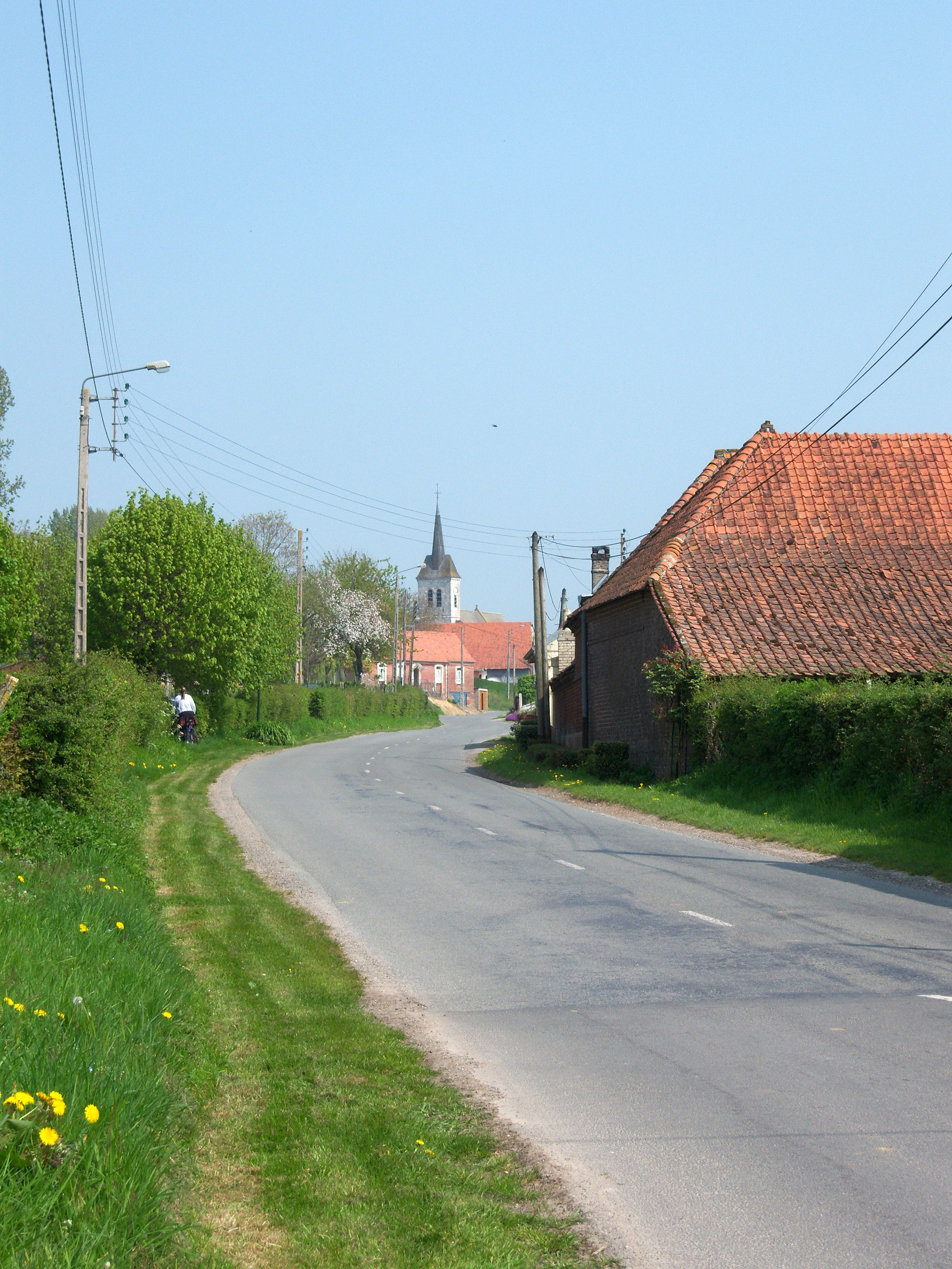 Vue du village.